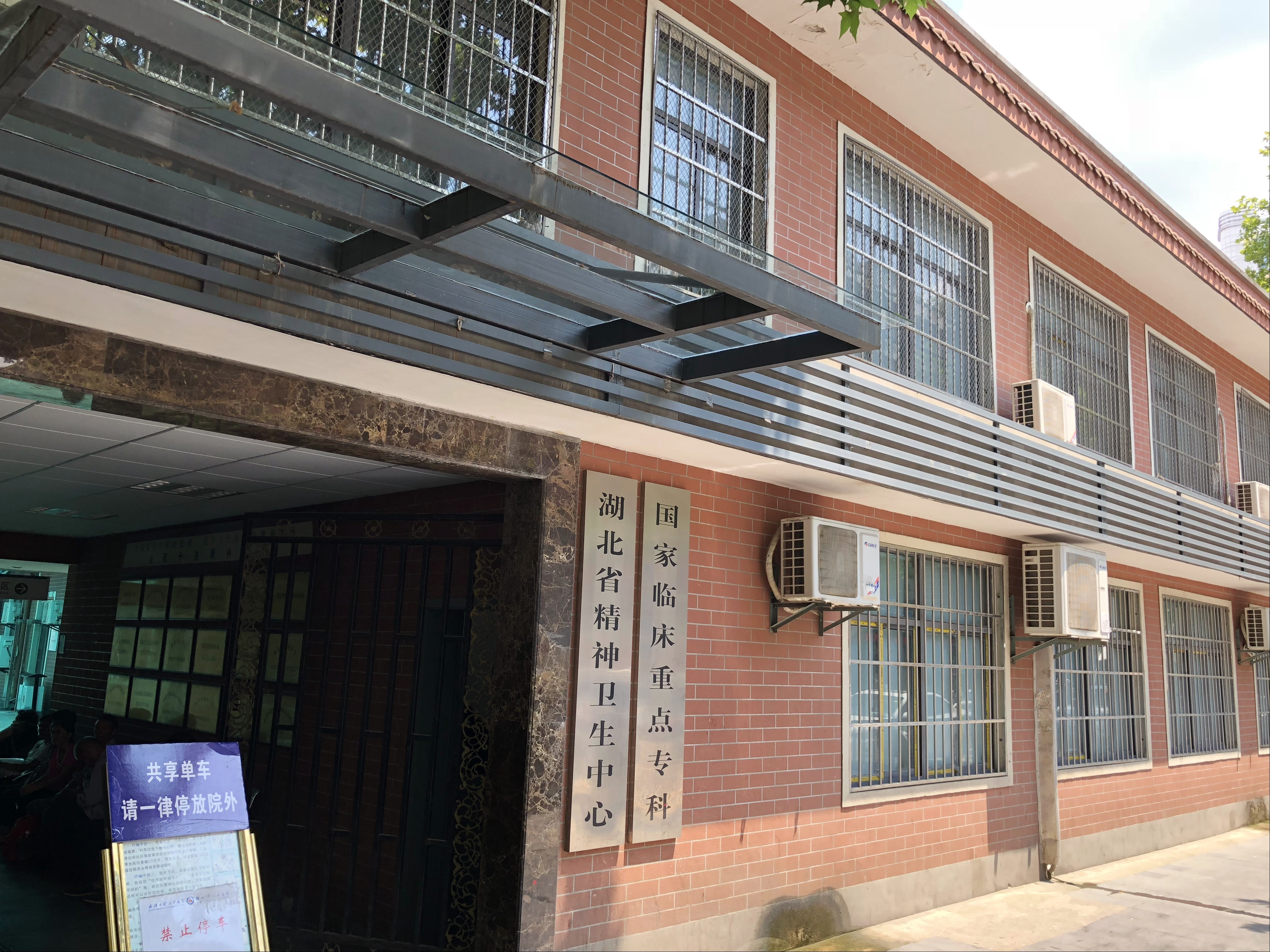 中文（中国大陆）: 湖北省精神卫生中心